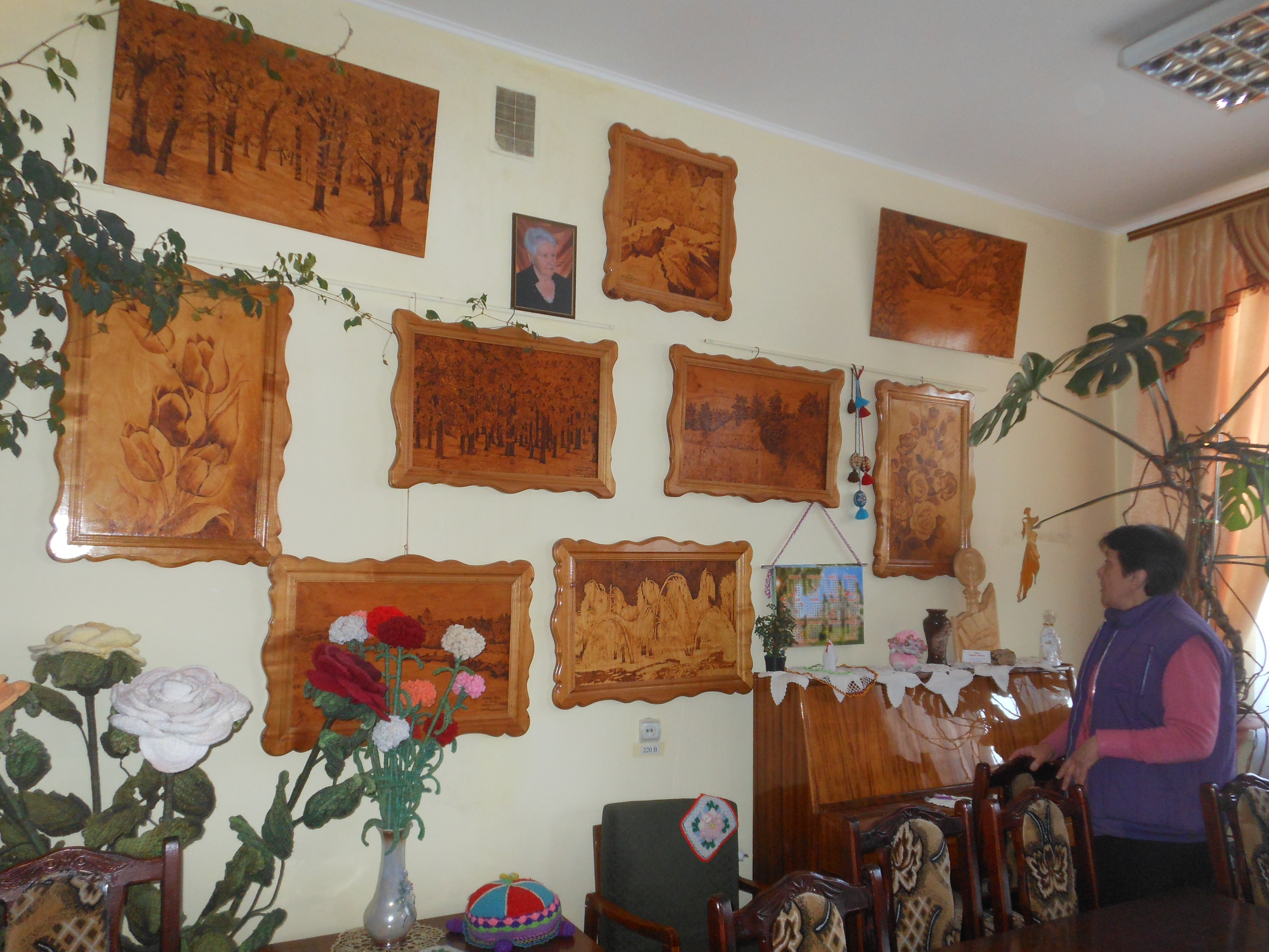 Вінниччинна,. Барська районна бібліотека, відділ мистецтв, картини Колісніченко Віри, 2018-03